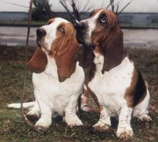 Amanda und Olivia von Pressburger Burger Basset Hound Kennel Makysova Kristine